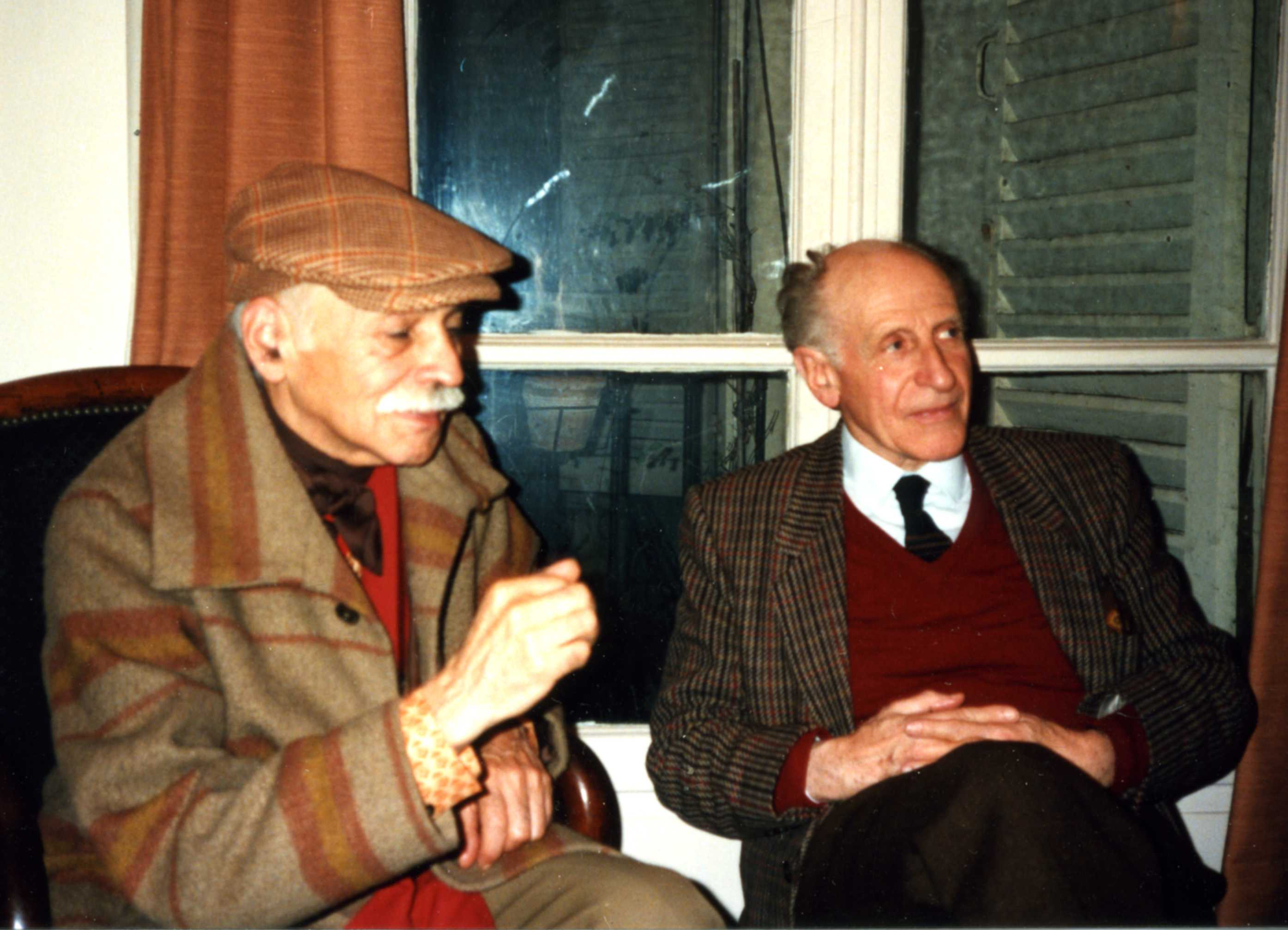 Le peintre chilien Eudaldo et l'écrivain français Georges-Emmanuel Clancier, Paris, 1987